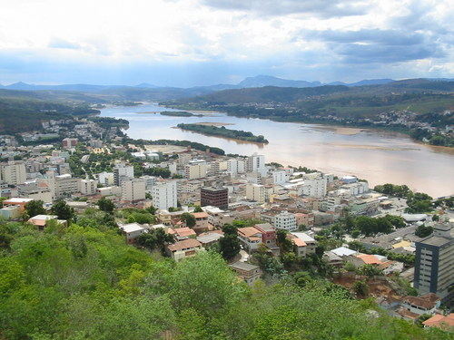 Rio Doce em Colatina